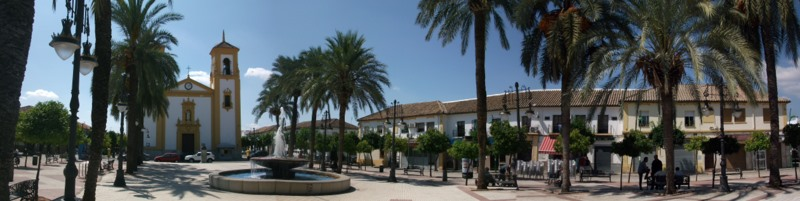 Cañero , Córdoba